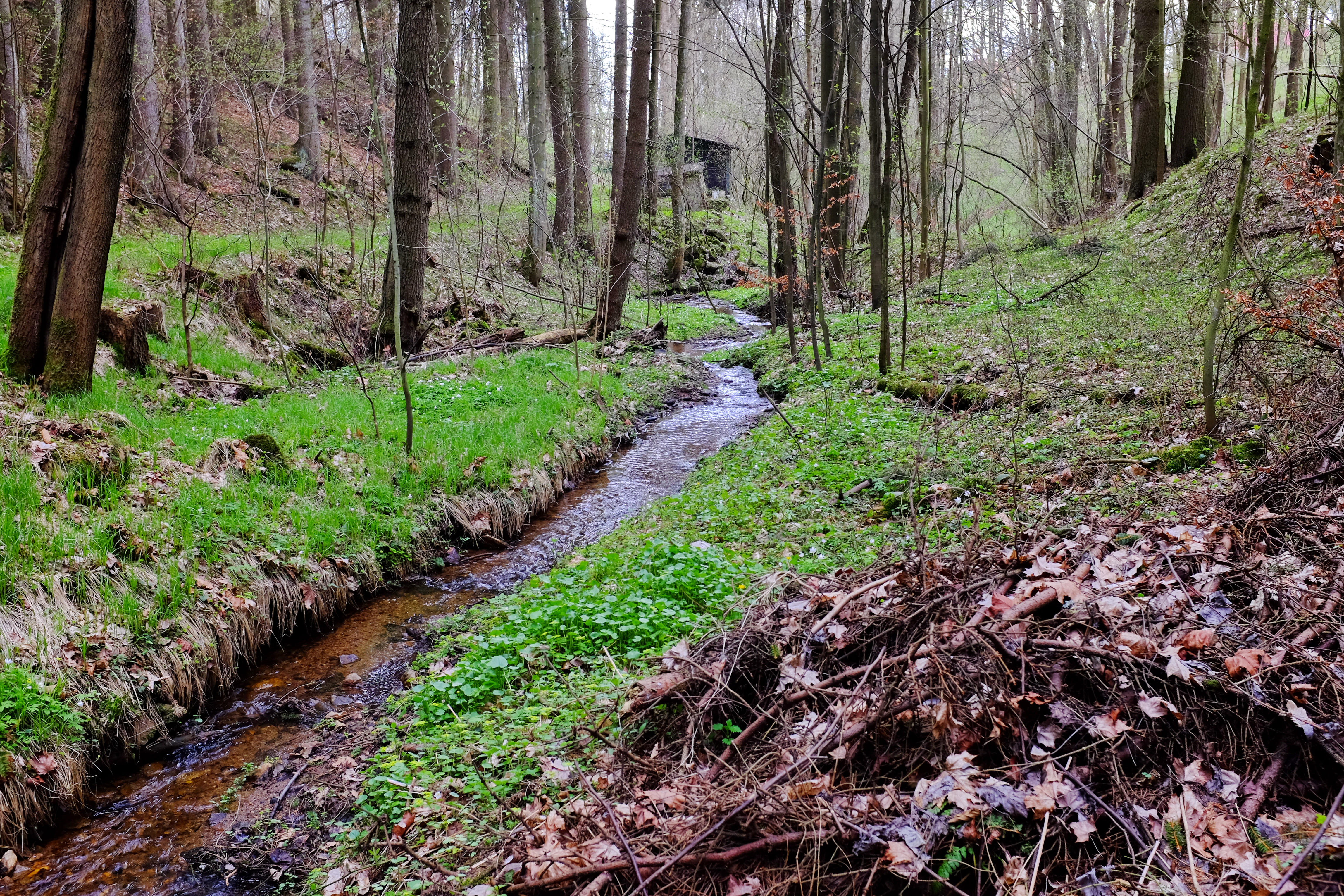 Kopaninský potok, přítok Plesné, v lese nad vesnicí Kopanina, okres Cheb